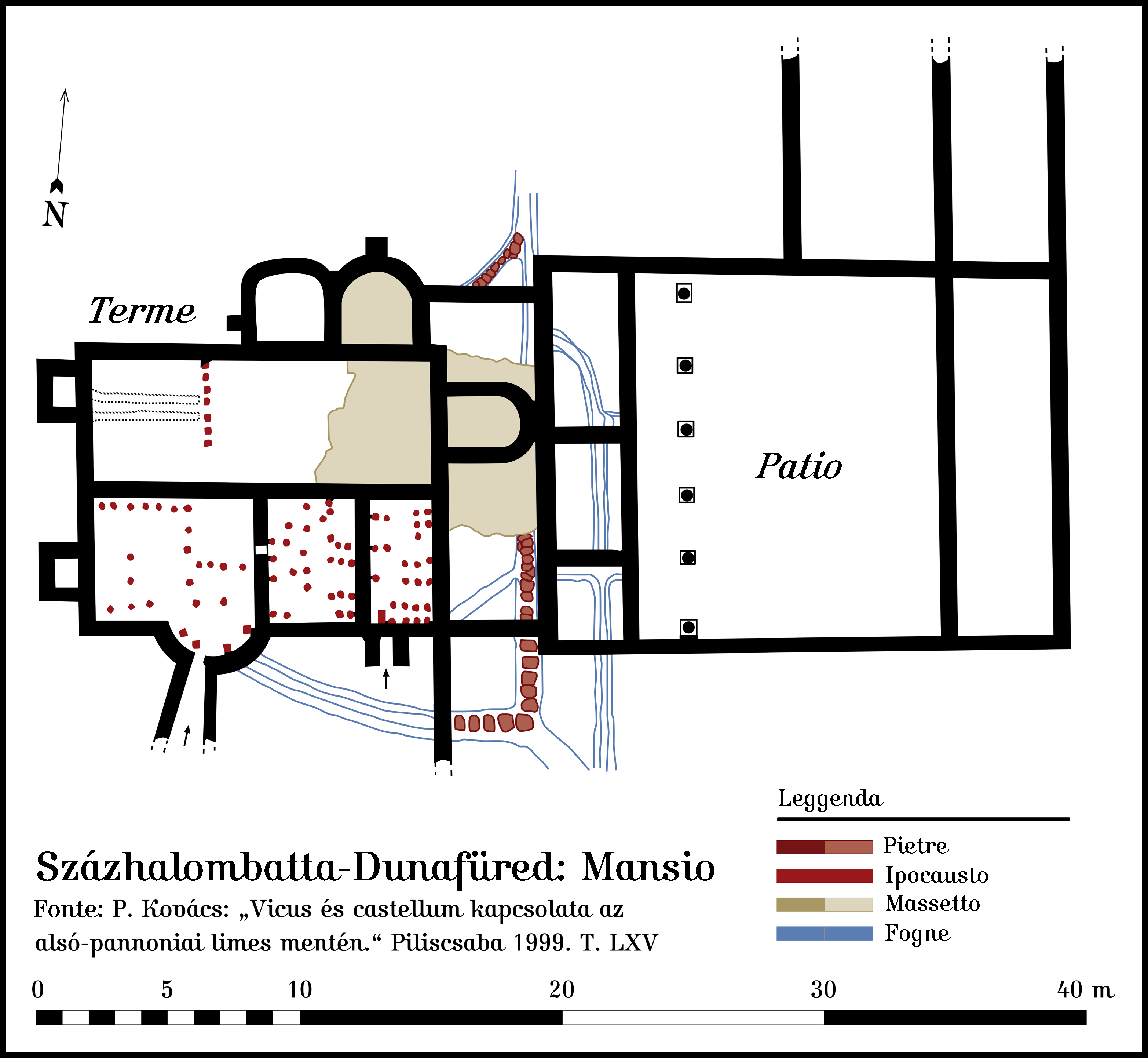 Vicus del forte di Százhalombatta-Dunafüred (Matrica, Ungheria): Mansio. La fonte di questa planimetria è quella specificata nel disegno: Péter Kovács, Vicus és castellum kapcsolata az alsó-pannóniai limes mentén. Studia Classica Universitas Catholicae De Petro Pázmány Nominatae Series Historica 1. PPKE BTK, Piliscsaba, 1999 ISBN 9630380749